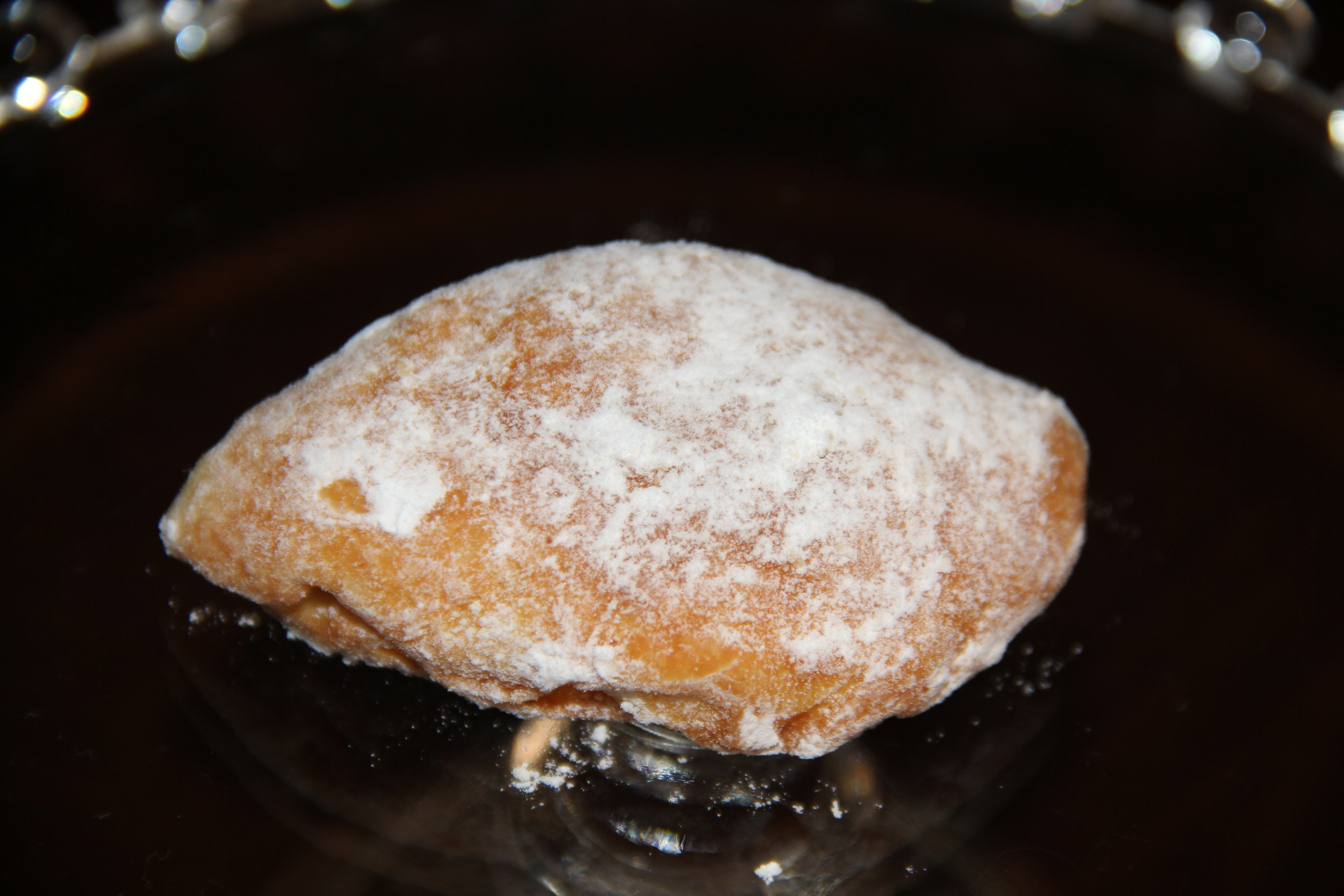 قطاب شیرینی ایرانی